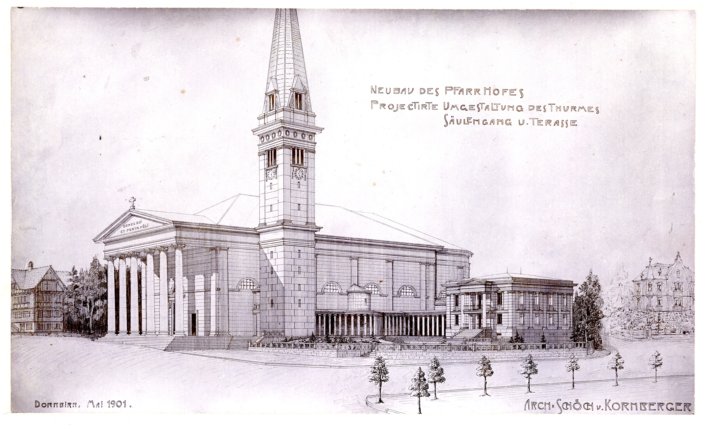 Skizze der Architekten Schöch und Kornberger zum projektierten Umbau der Stadtpfarrkirche St. Martin in Dornbirn, 1901.